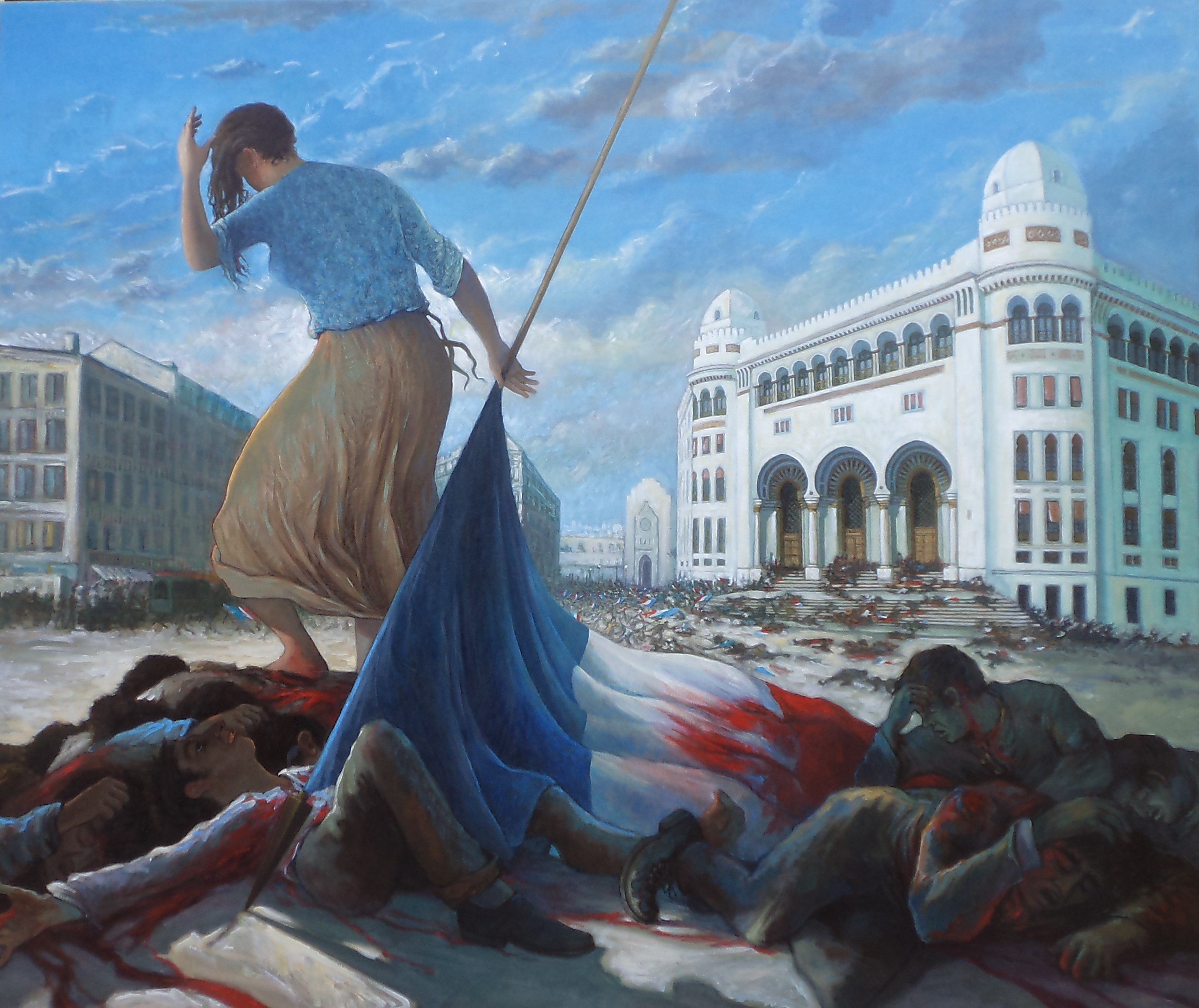 ALGER- Fusillade du 26 Mars 1962 Rue d' Isly- Htl : 135 X 160 cms Exposée au Grand Palais PARIS.2018